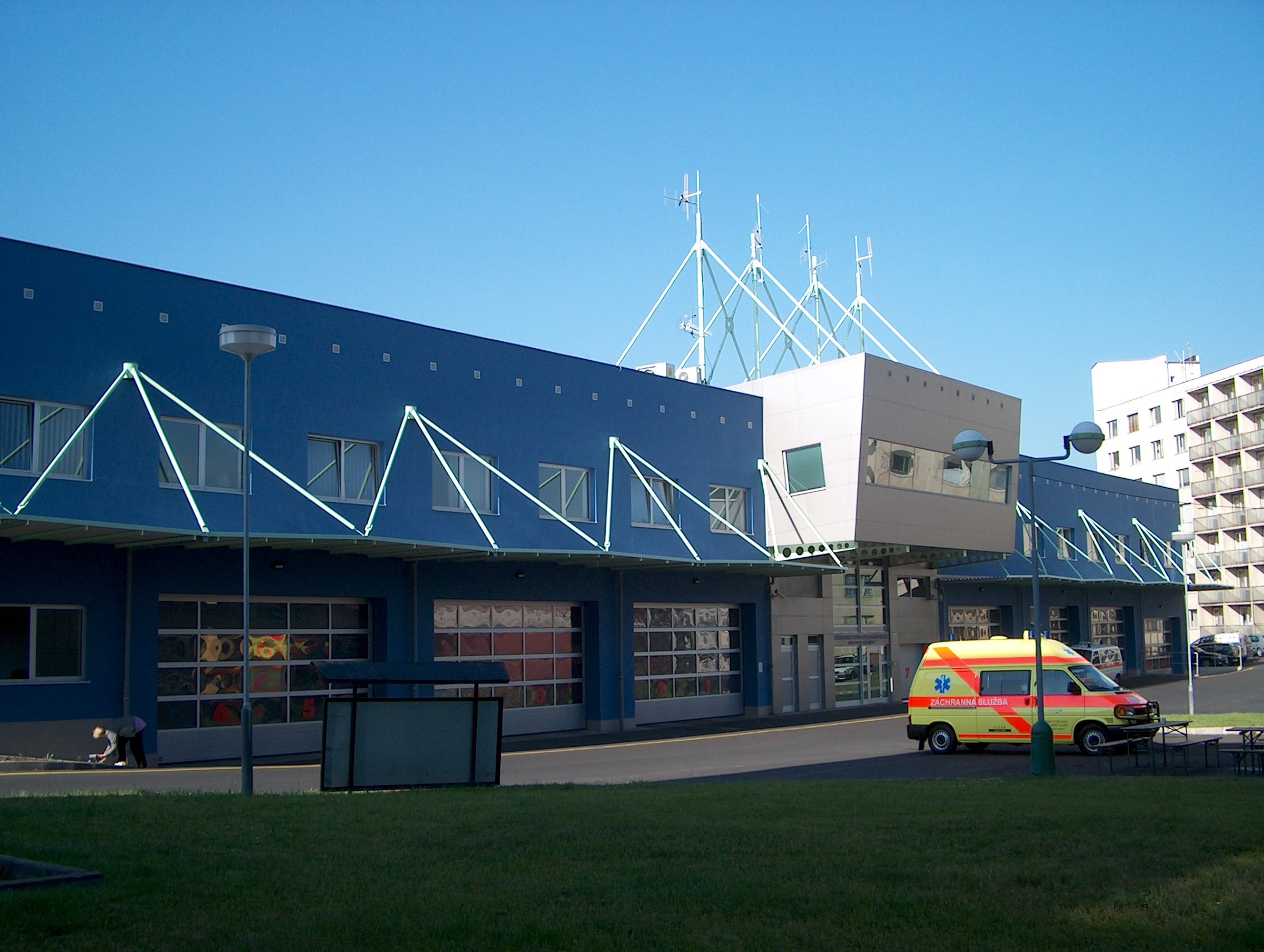 ZZS ÚK, výjezdové stanoviště Ústí nad Labem.jpg